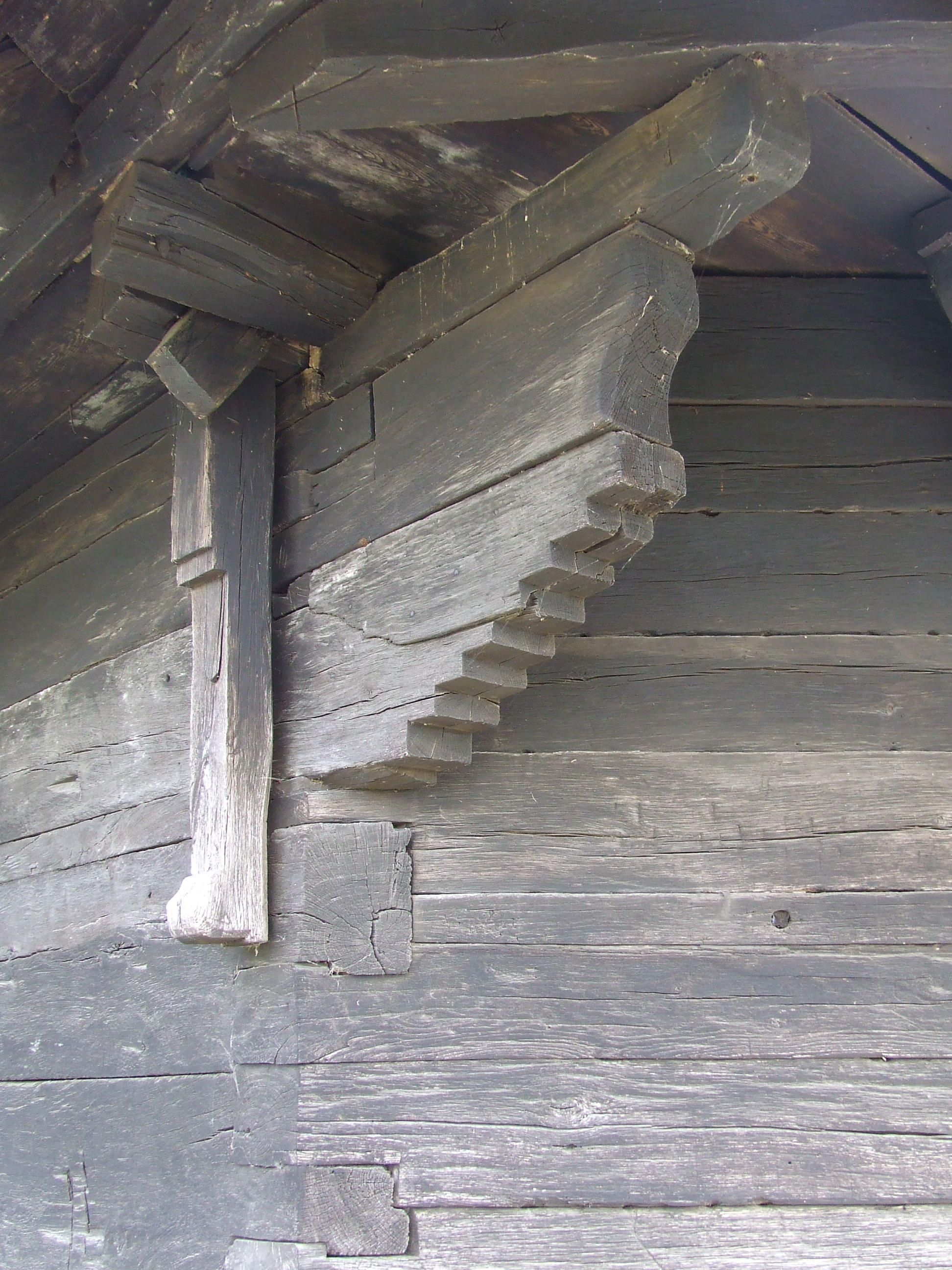 Biserica de lemn din Gălgău, judeţul Sălaj. Detaliu Autor: Bogdan Ilieş Data: mai 2007